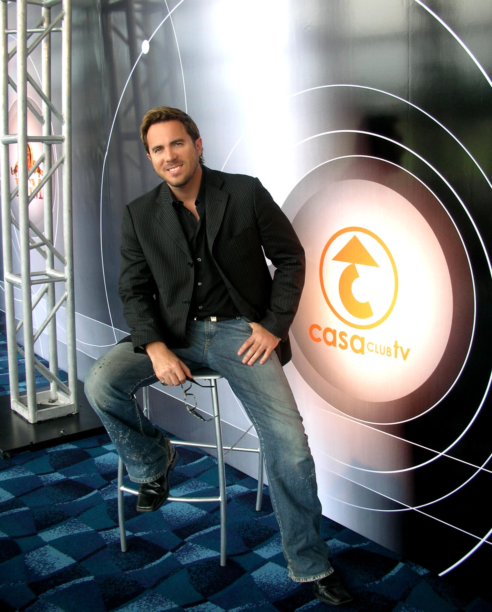 Foto tomada para la presentación de un programa en Casa Club TV